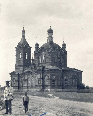 Город Константиновск Покровский собор